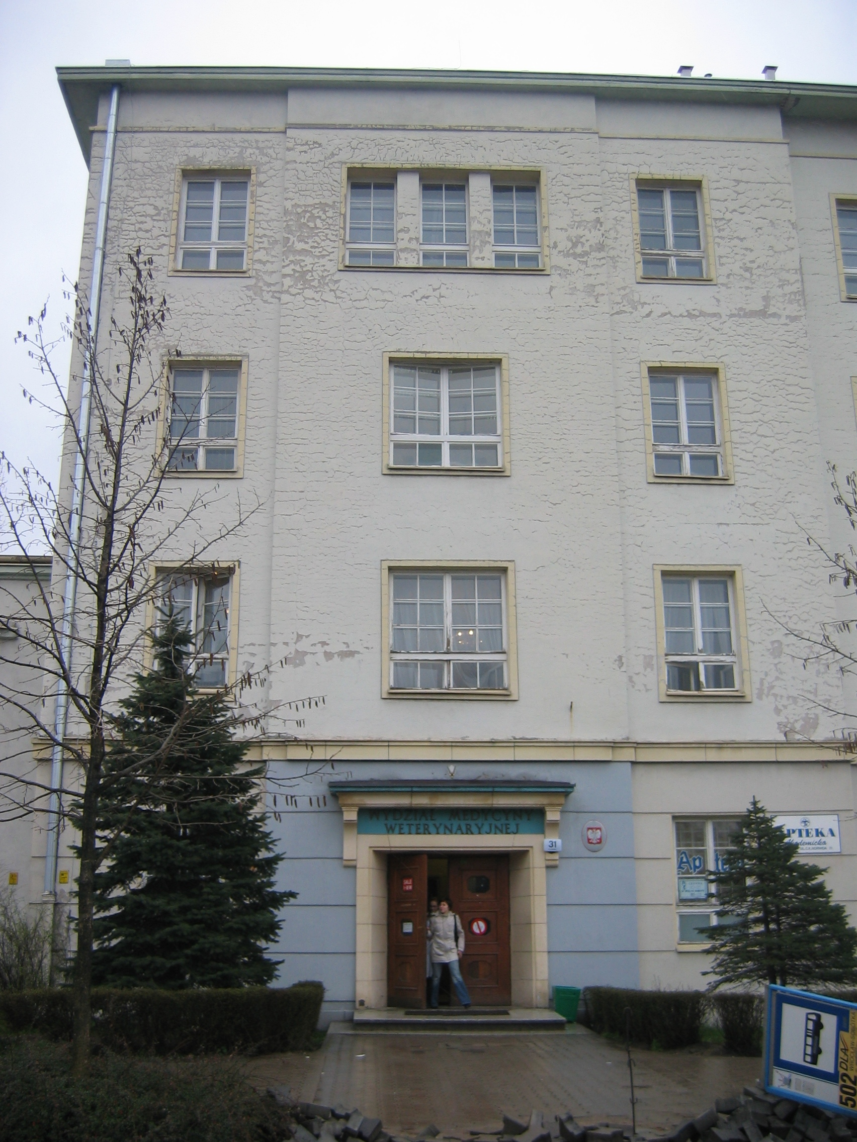 Dziekanat Wydz Medycyny Weterynaryjnej Uniwersytetu Przyrodniczego we Wrocławiu